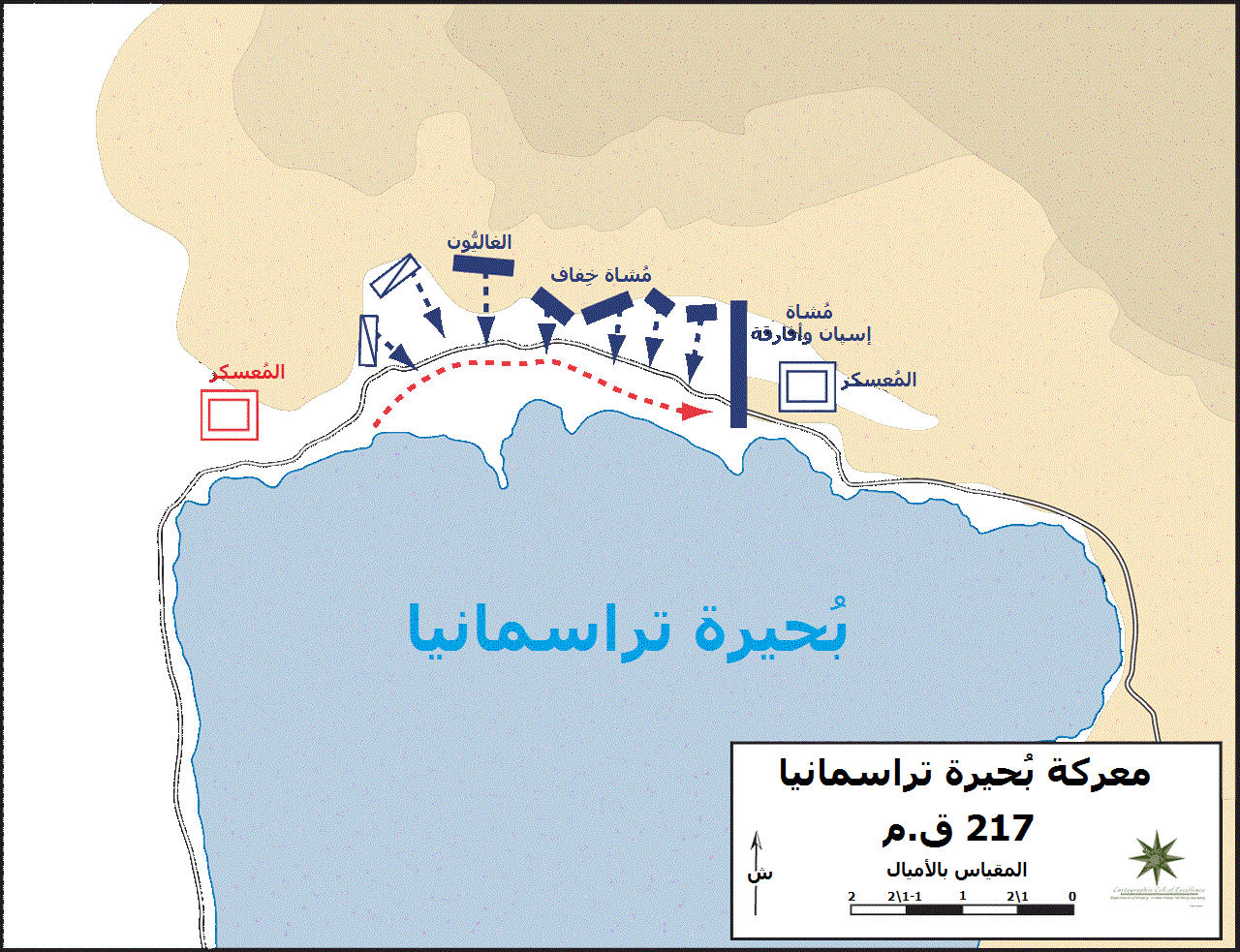 مُخطط معركة بُحيرة تراسمانيا بين القرطاجيين بِقيادة حنبعل (هنيبعل) والرومان بِقيادة گايوس فلامينيوس.